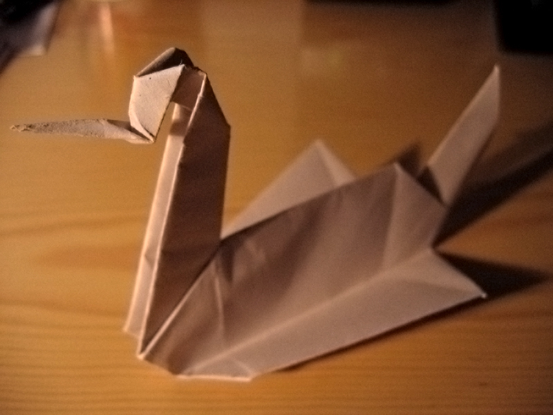 Se trata de la grulla que Michael Scofield usa para enviar mensajes a la doctora Sara Tancredi en la serie americana Prison Break. ???